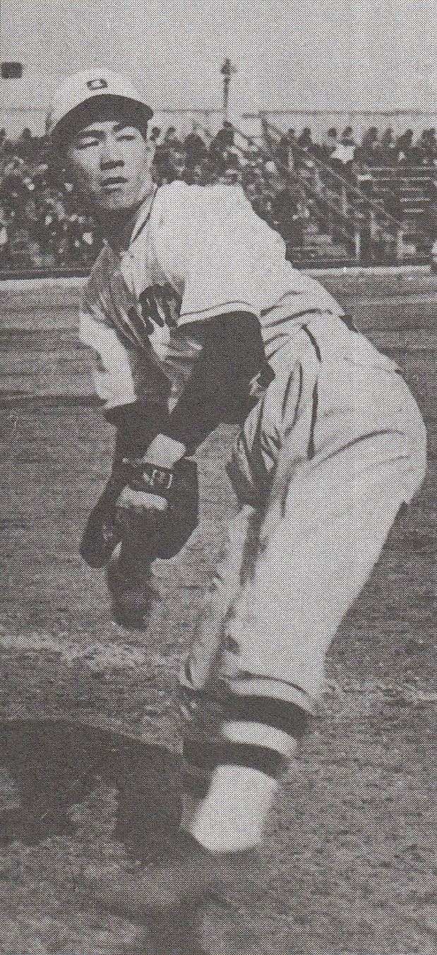 A baseball player from Japan, Eiji Sawamura（沢村栄治）